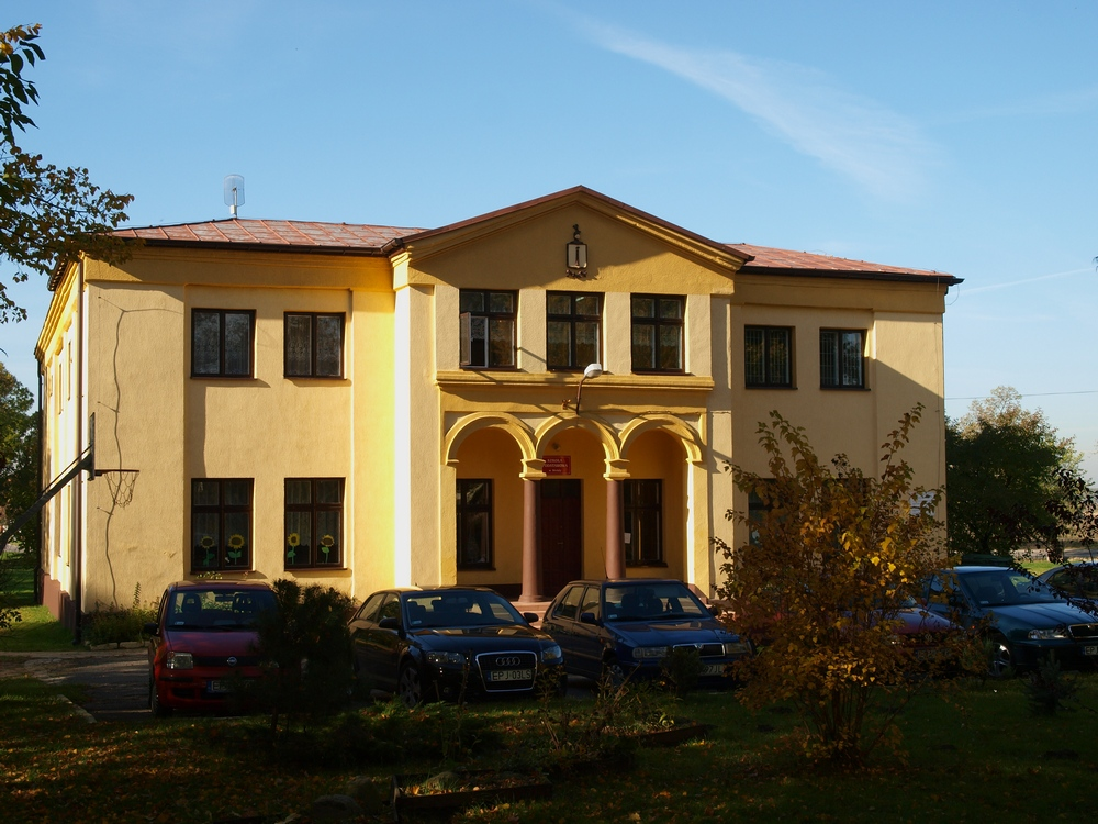 Szkoła w Stróży dawny dworek 05.1946.